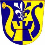 znak obce Cástkov